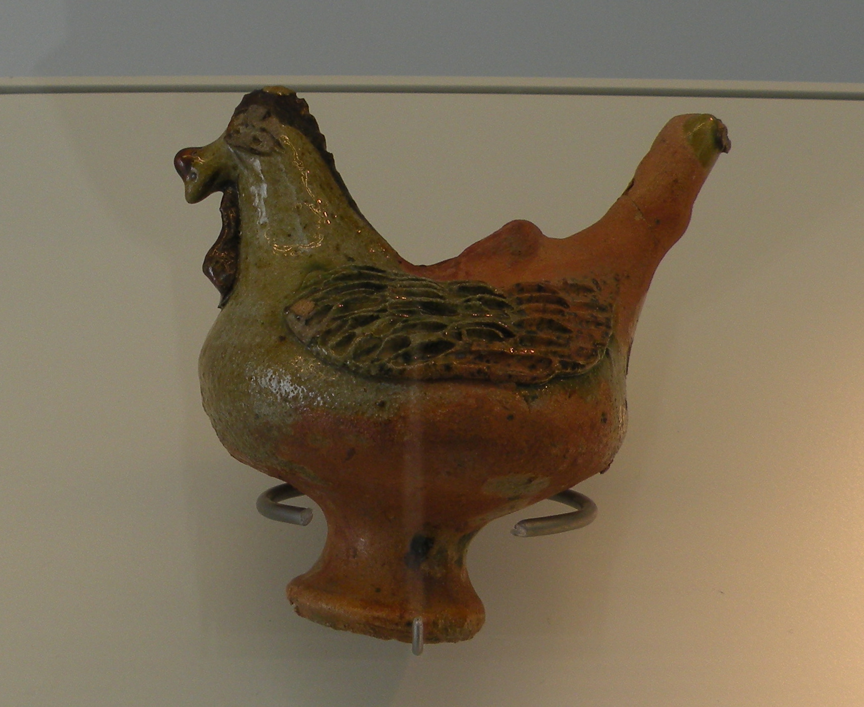 Archéa sifflet en céramique trouvé à Fosses datant du 16e siècle